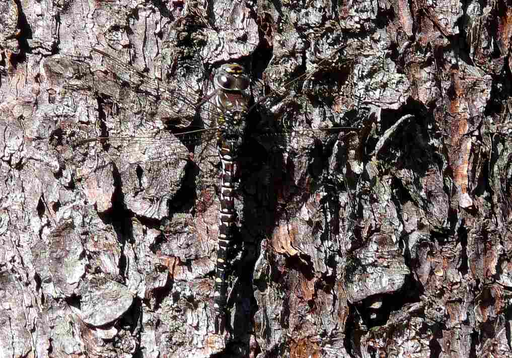 Żagnica torfowcowa - samica